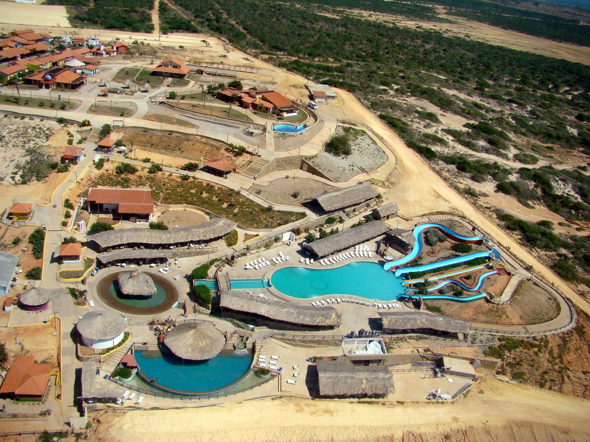 Parque temático Musipán, ubicado en el estado Nueva Esparta, Venezuela